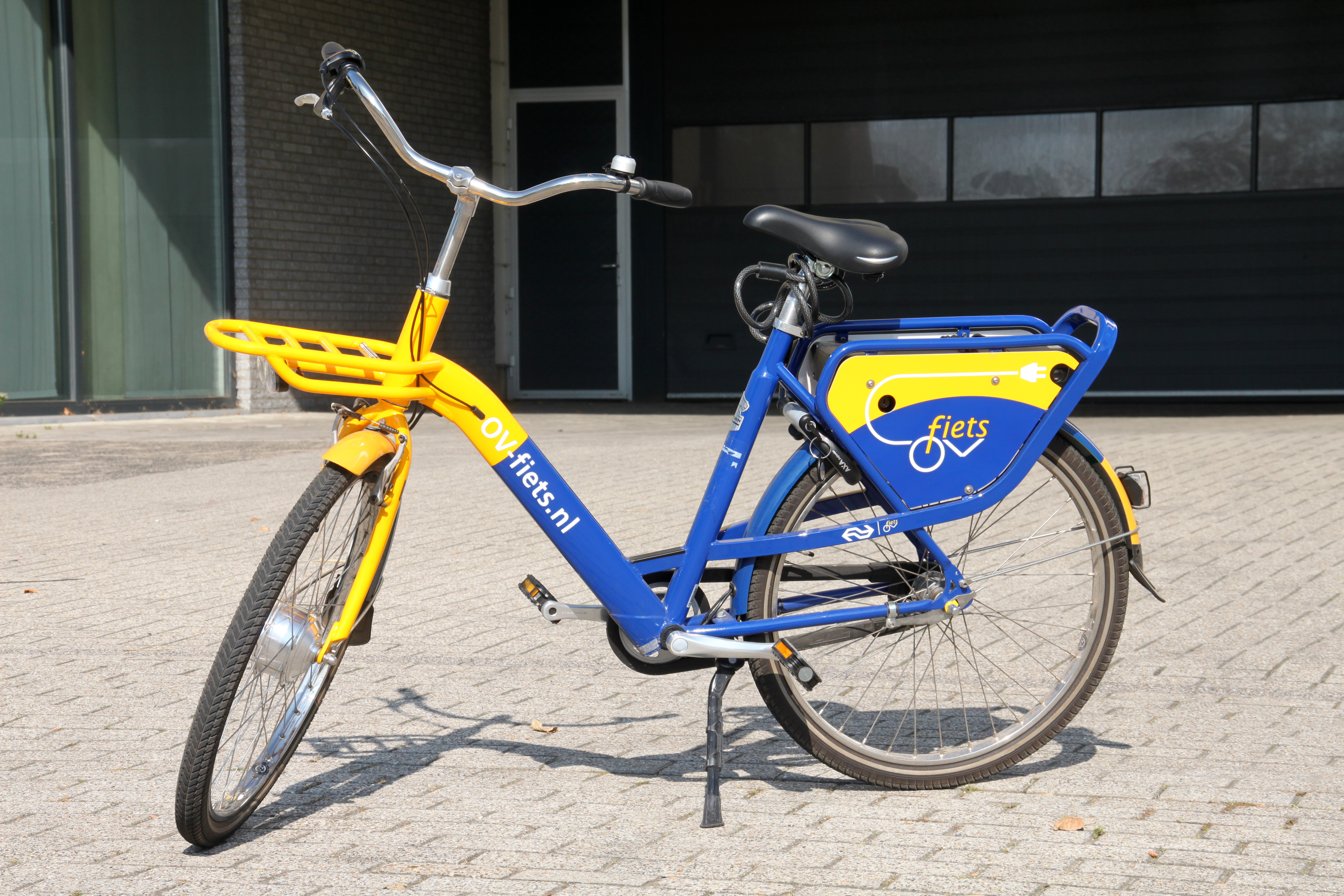 Een electrische OV-fiets, dat wil zeggen een bij stations te huren fiets met trapondersteuning, poseert in de zon in Eindhoven.